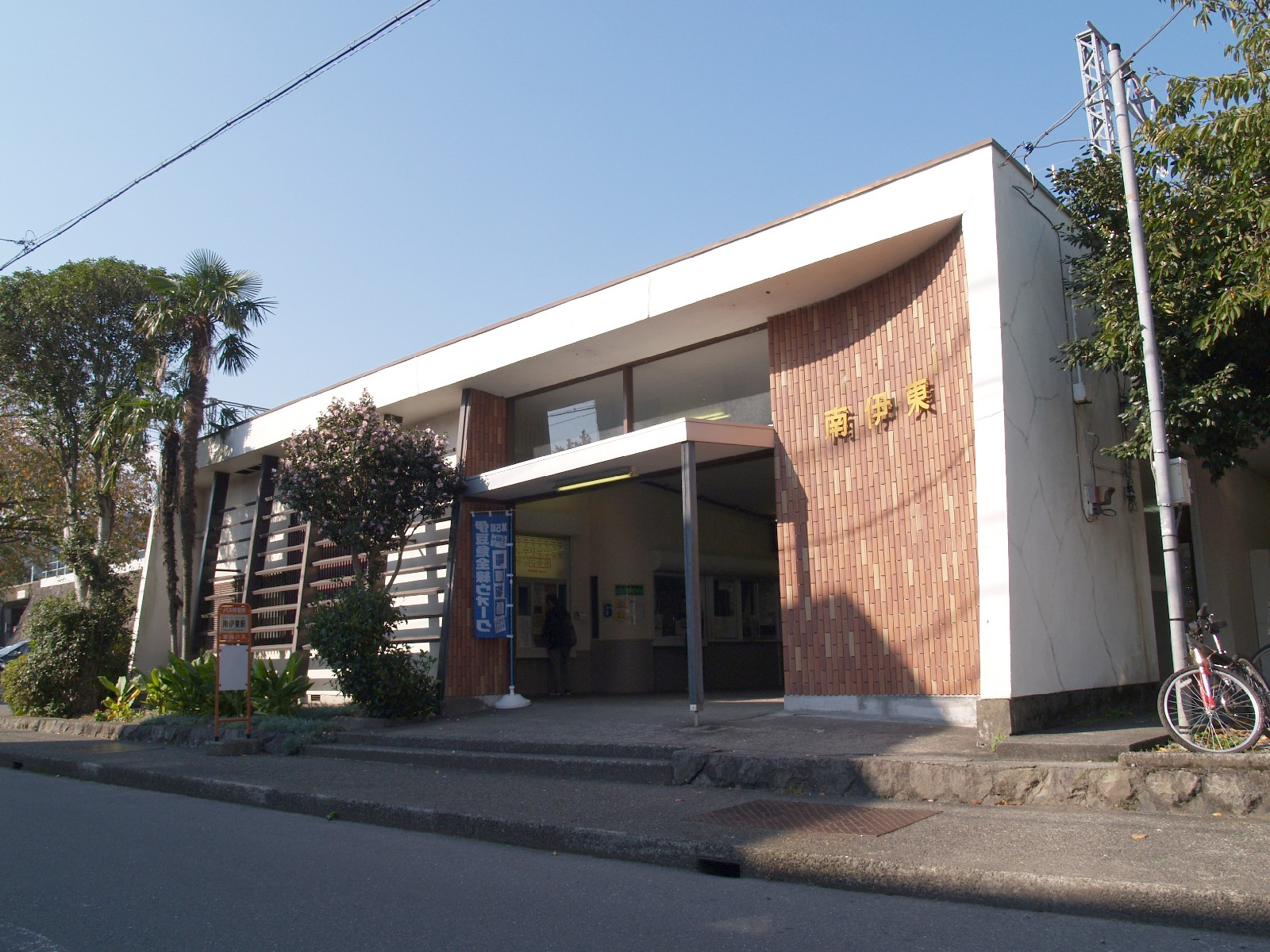 南伊東駅